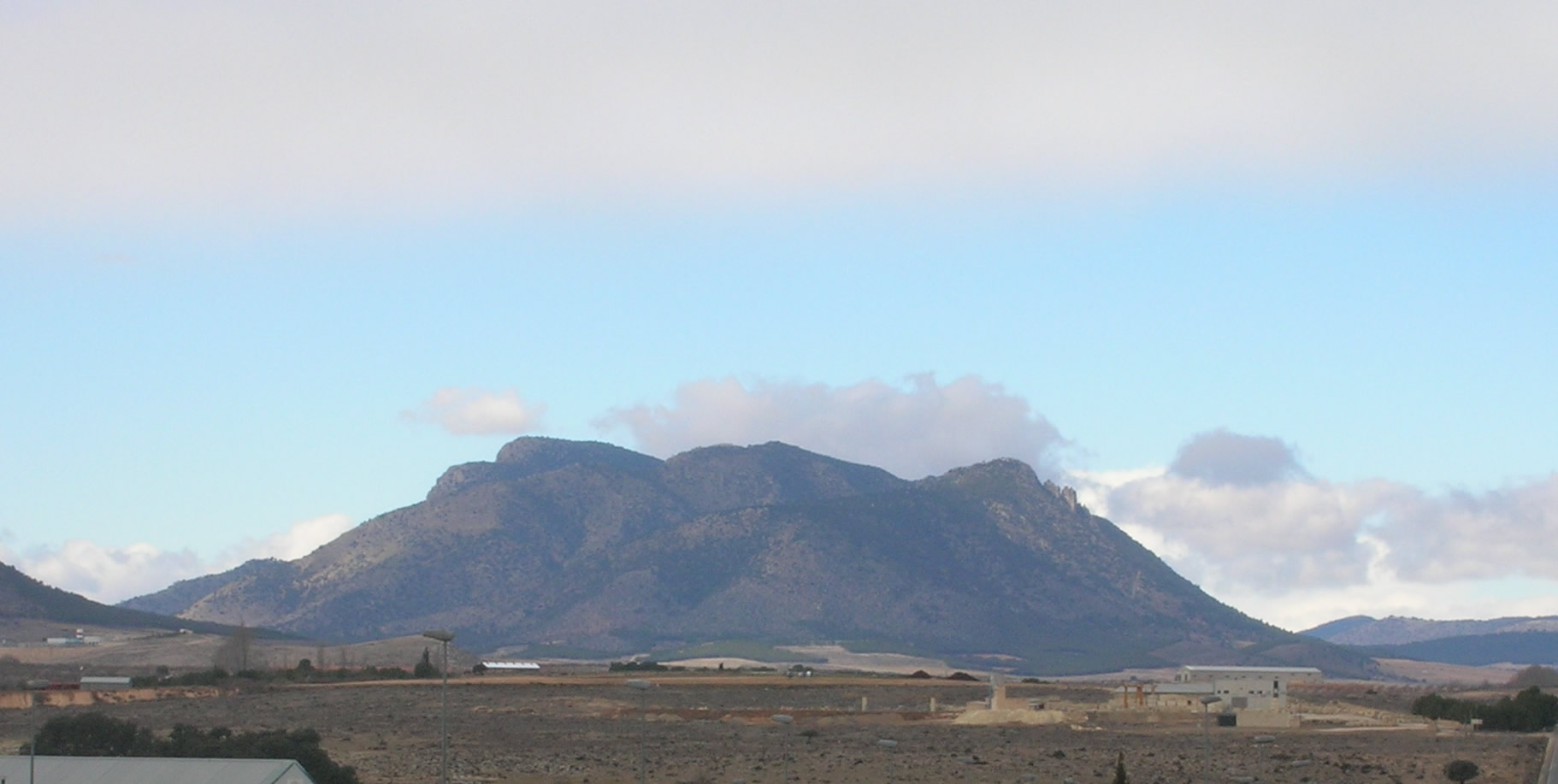 Sierra de Mojantes, cara E, desde Barranda. Caravaca de la Cruz, Murcia, España. Fotografía propia, dominio público.